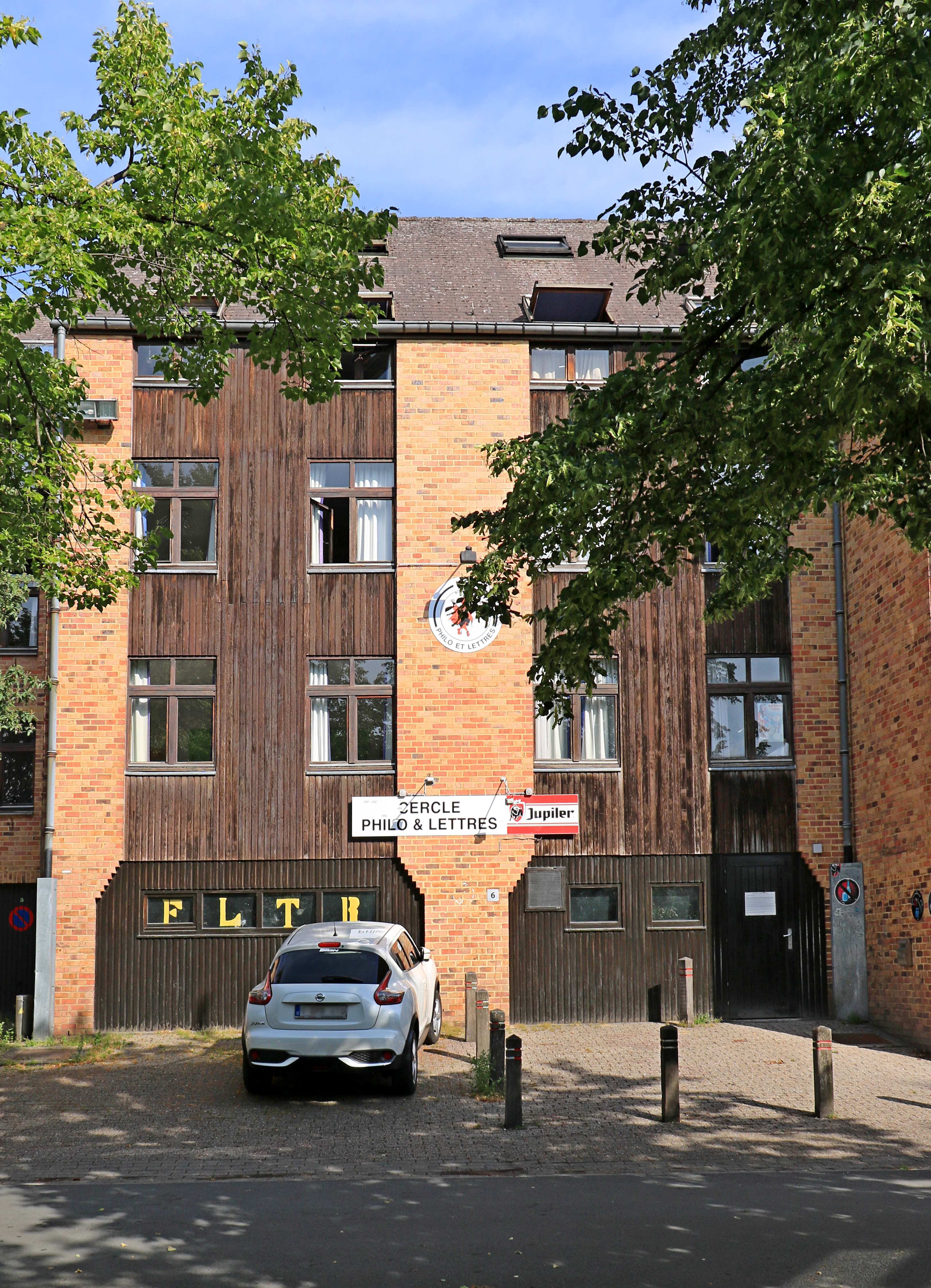 Belgique - Louvain-la-Neuve - Cercle de Philo et Lettres (voie Cardijn 6)